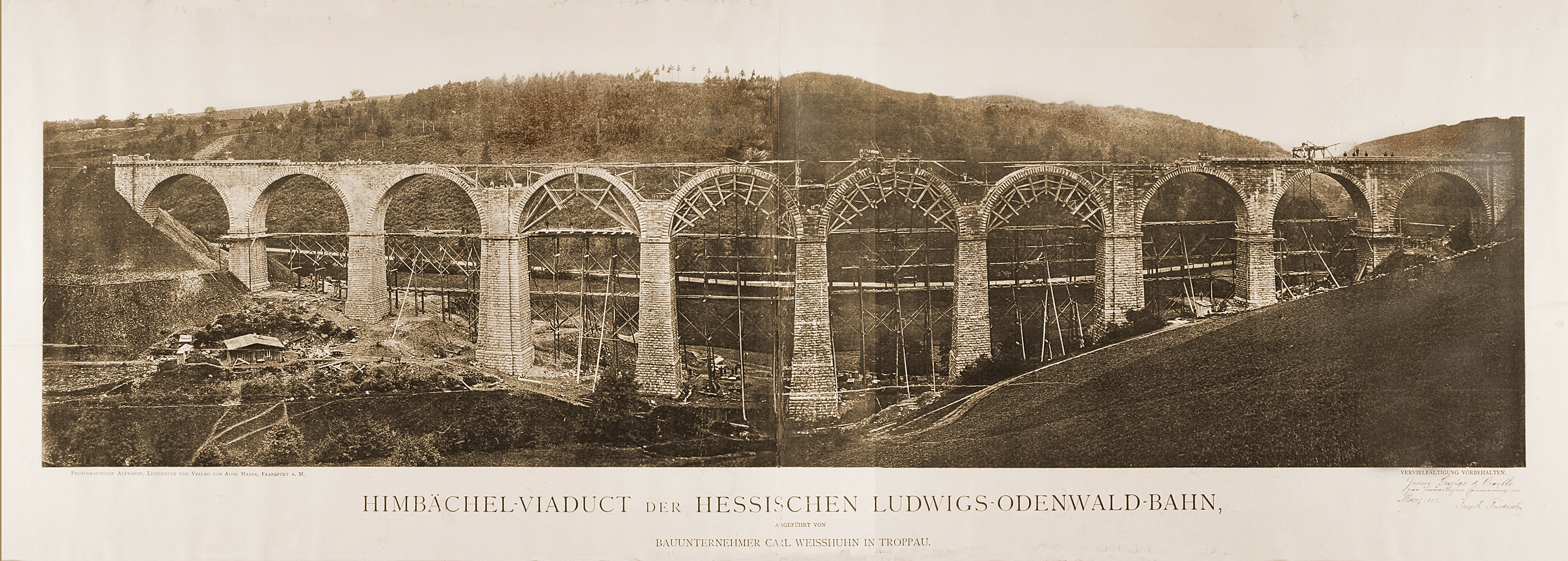 Das Himbächel-Viadukt bei Beerfelden-Hetzbach zum Zeitpunkt der Errichtung 1881